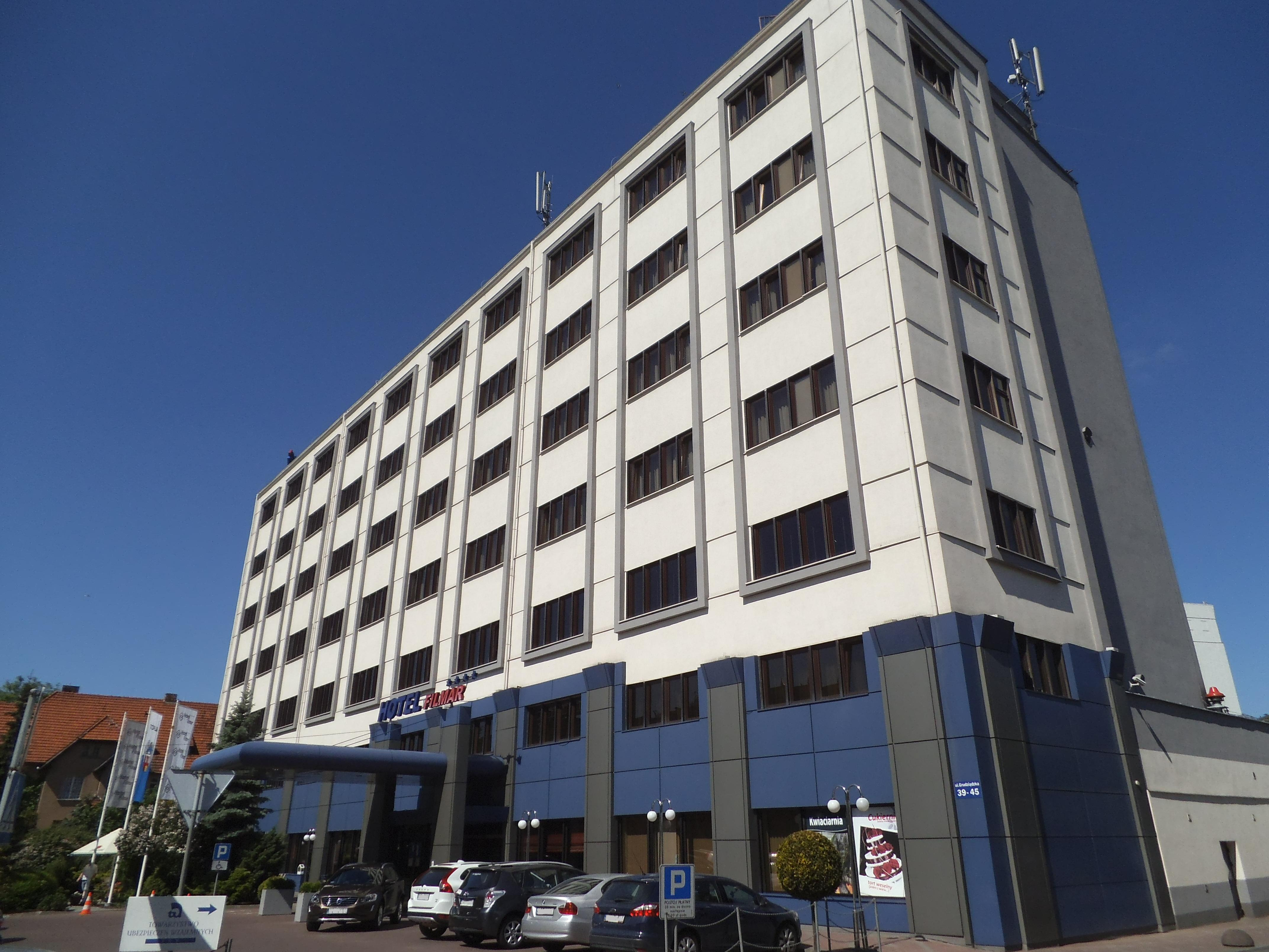 Hotel Filmar w Toruniu